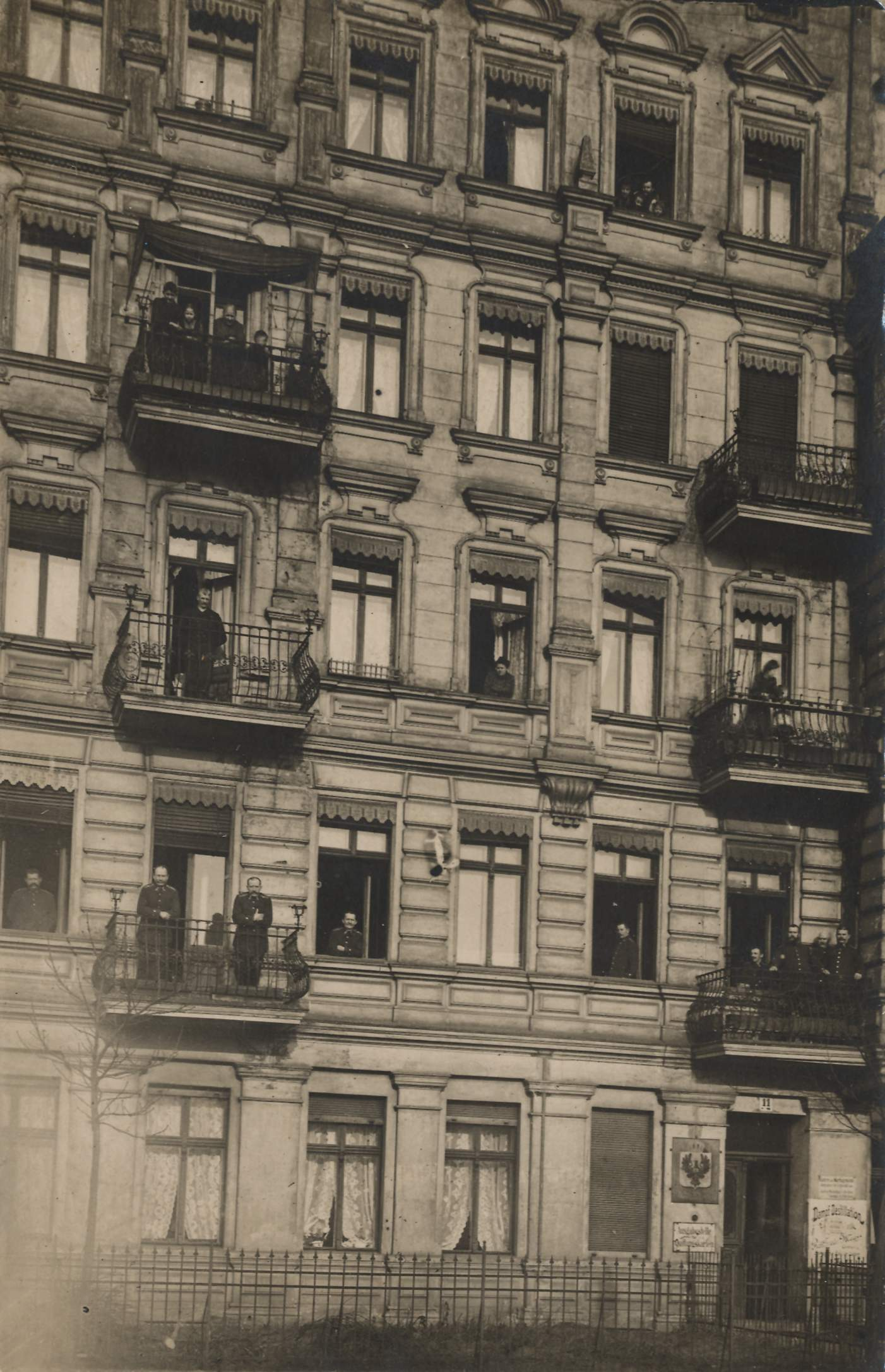 Küsterei der Martha-Kirche, Kottbusser Ufer 11 (heute Paul-Lincke-Ufer), Berlin-Kreuzberg. Die Kirche befindet sich in der Glogauer Straße 22.